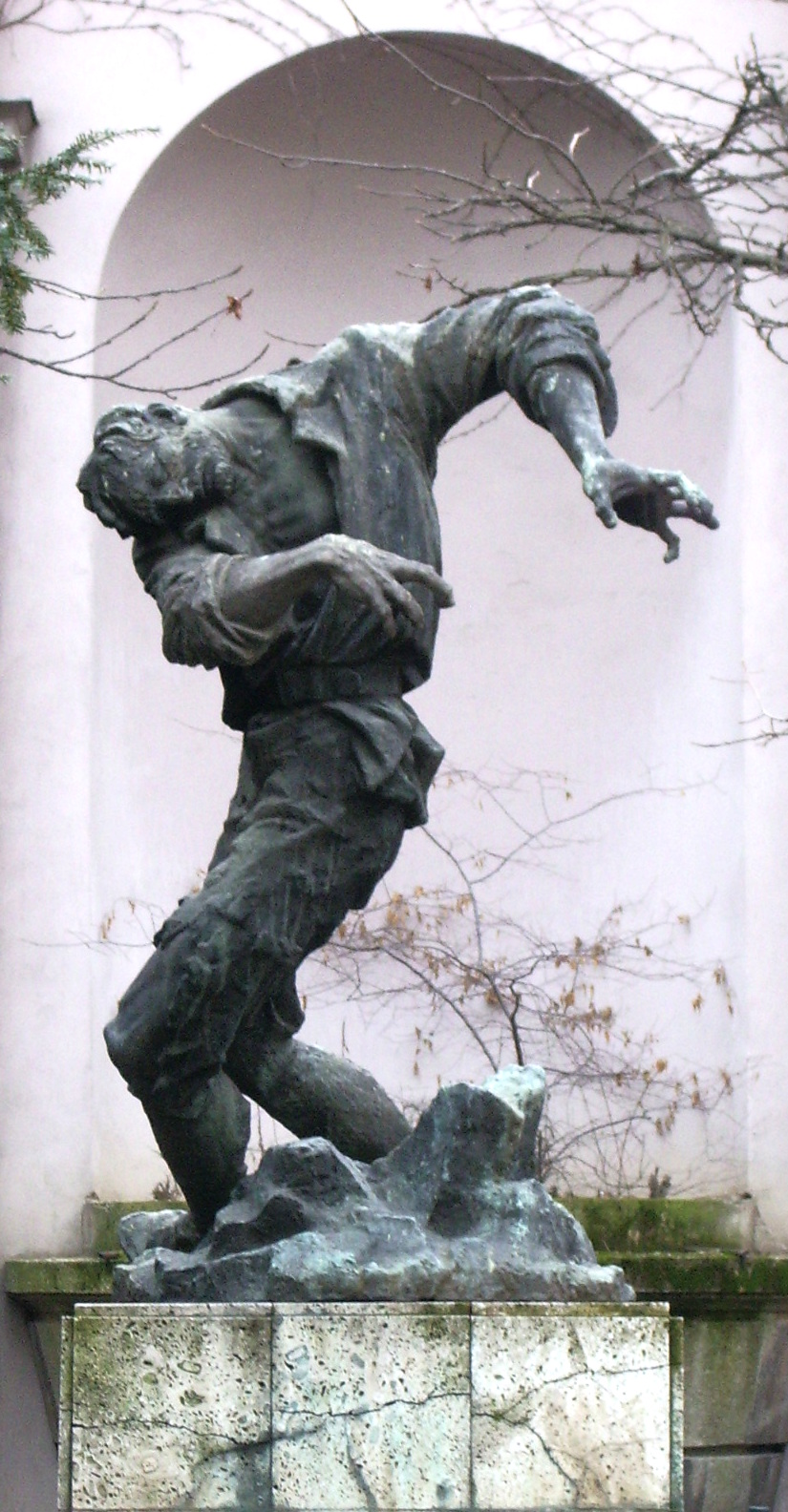 skulptura "Ranjenik" Vanje Radauša smještena na cvjetnom rondu u dvorištu Moderne galerije u Zagrebu.